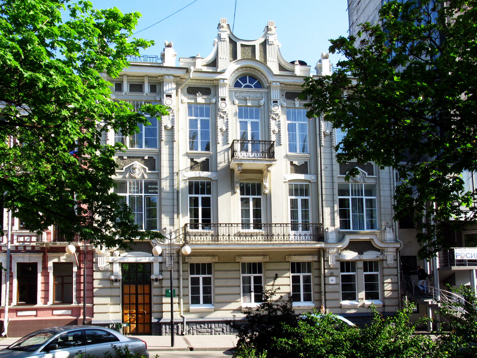 Доходный Дом Бостригиных, 1914 год